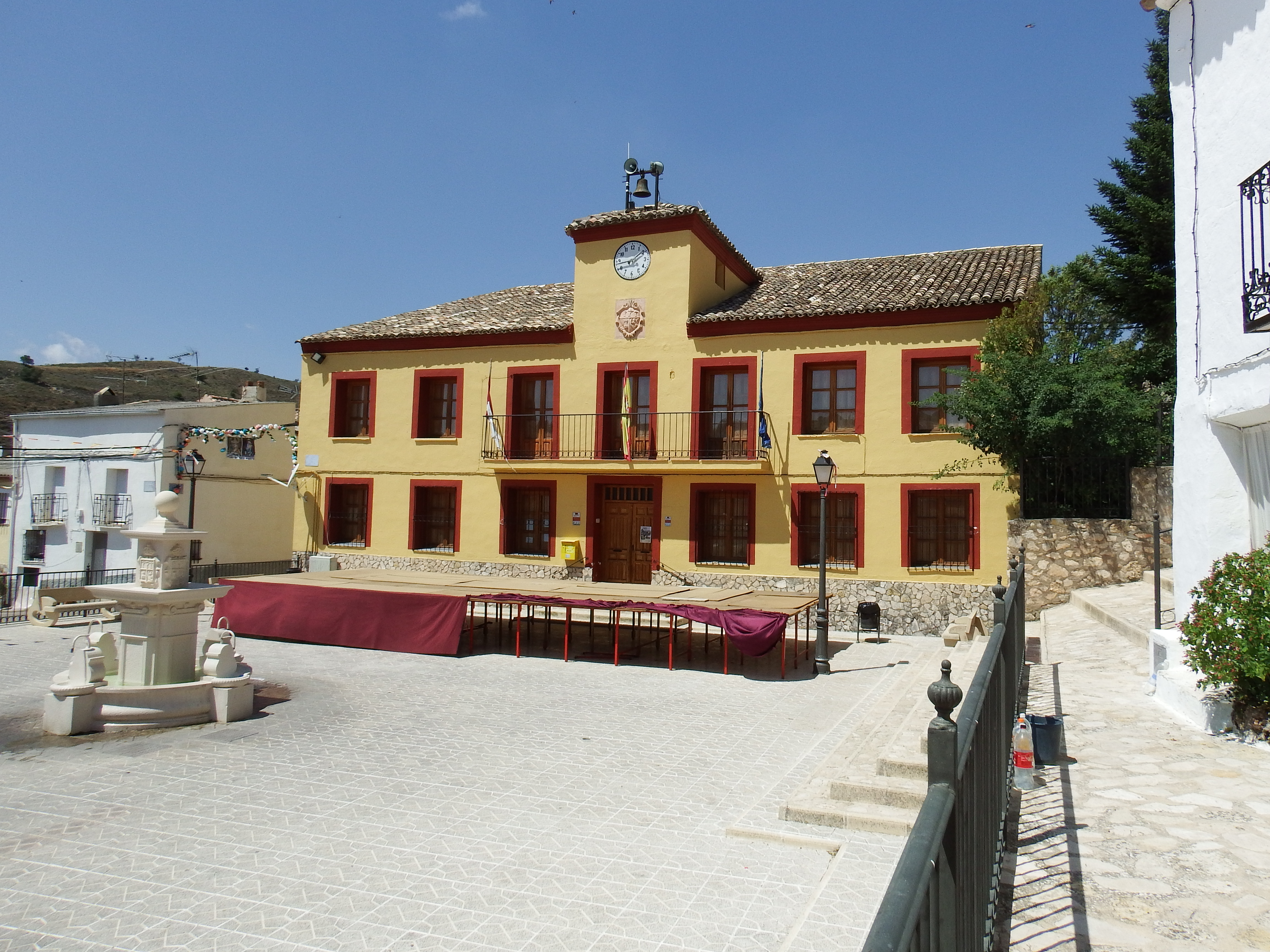 Pineda de Gigüela, Ayuntamiento.